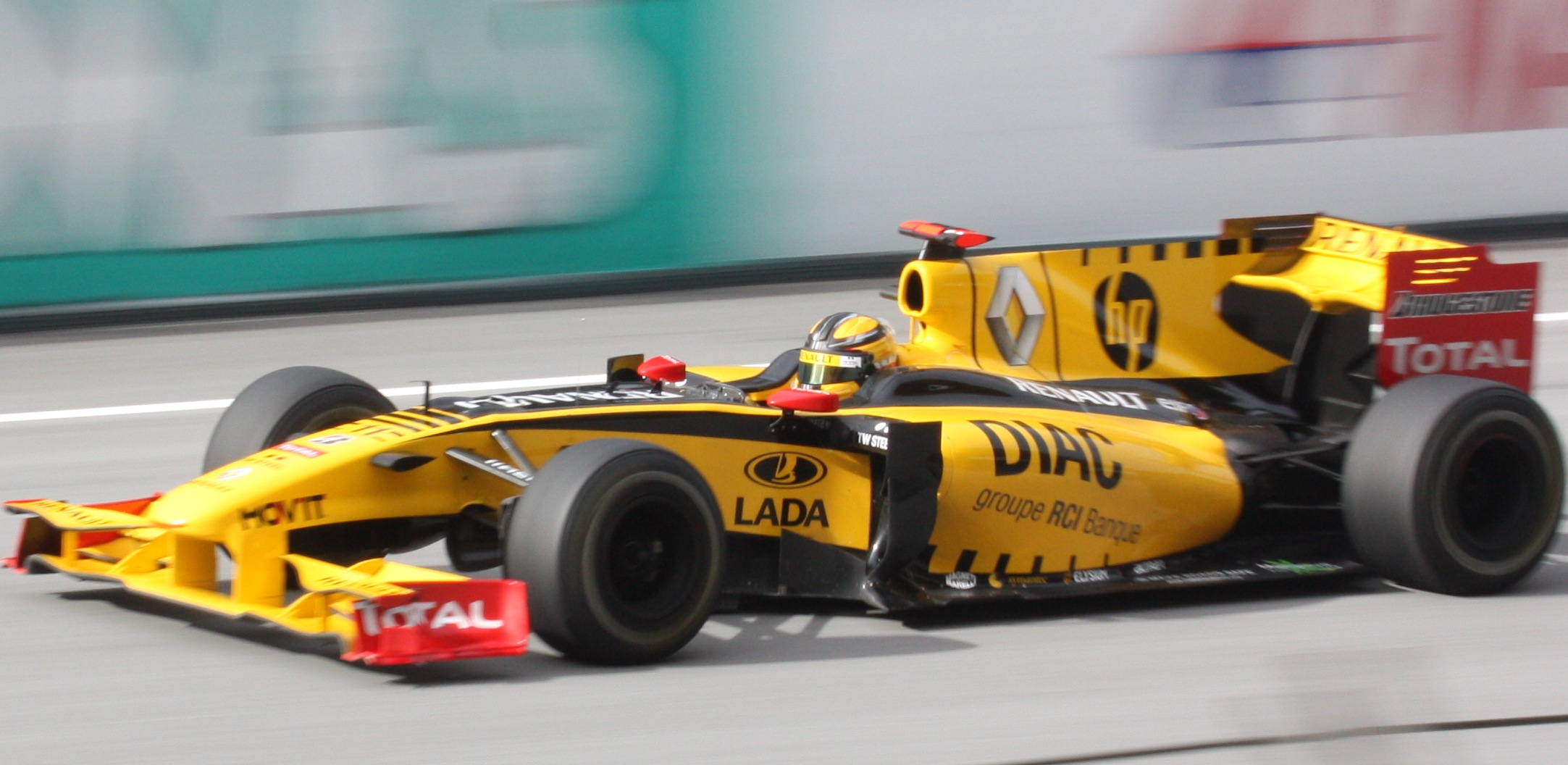 Kubica at malaysia